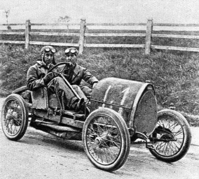 Louis Charavel, dit Jean'Sabipa', au Meeting de Boulogne 1920 sur Bugatti - Le Monde illustré du 26 août 1920, p.128